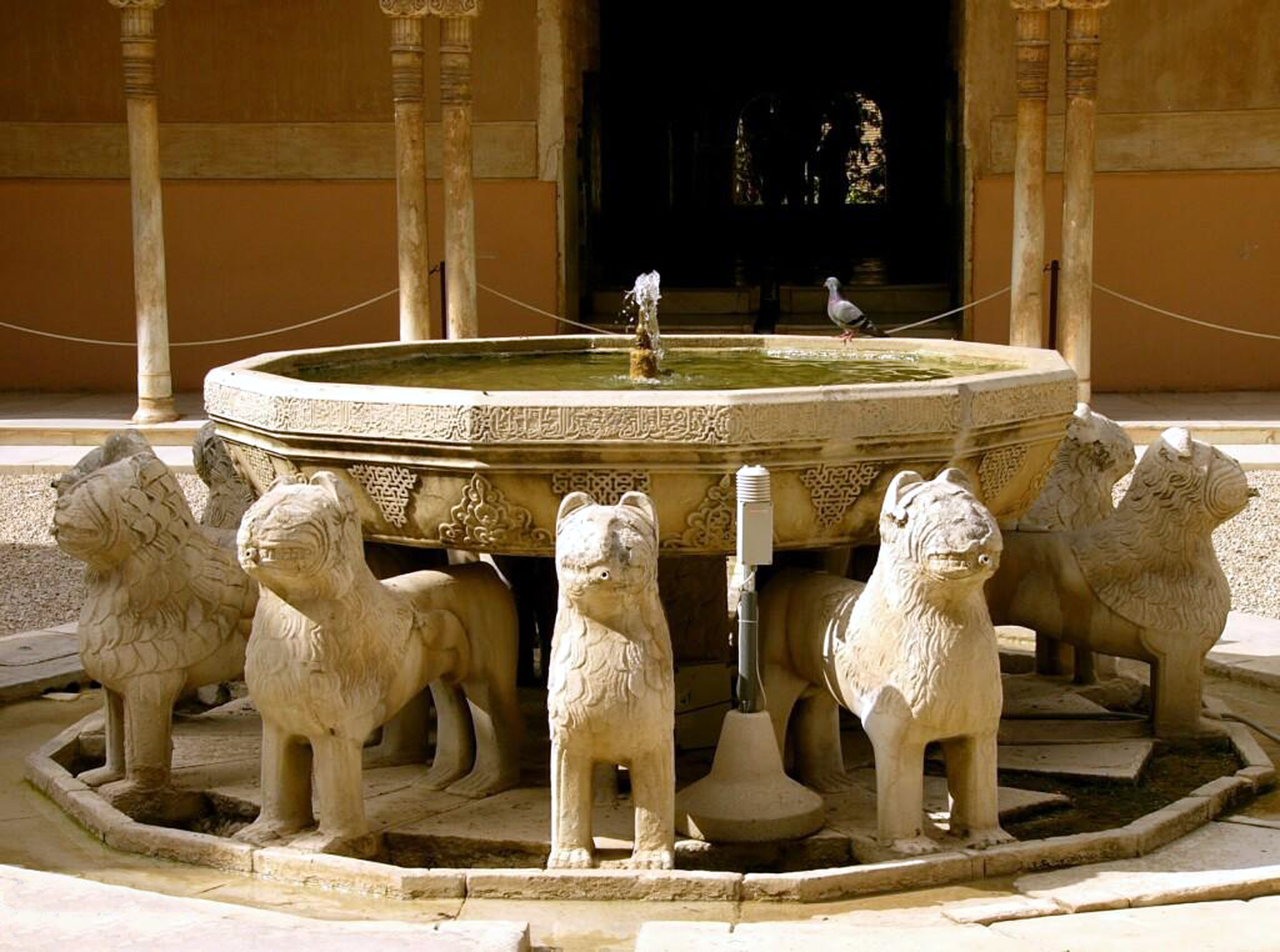 Patio de los Leones. Alhambra. Granada, España.